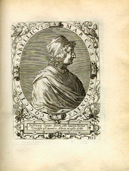 Marco Antonio Sabellico (1436-1506)